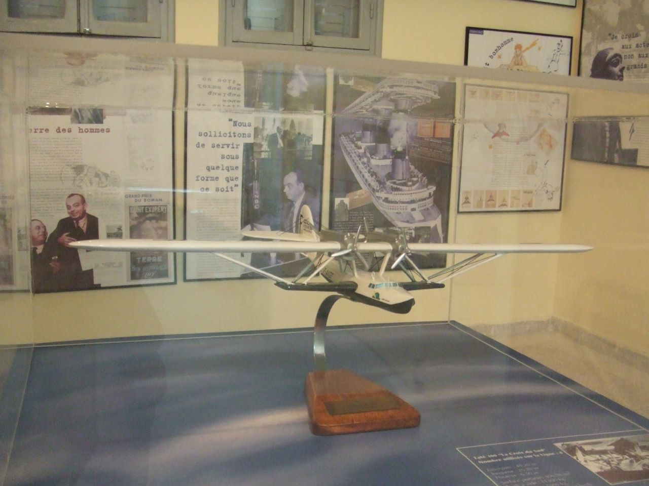 Tarfaya